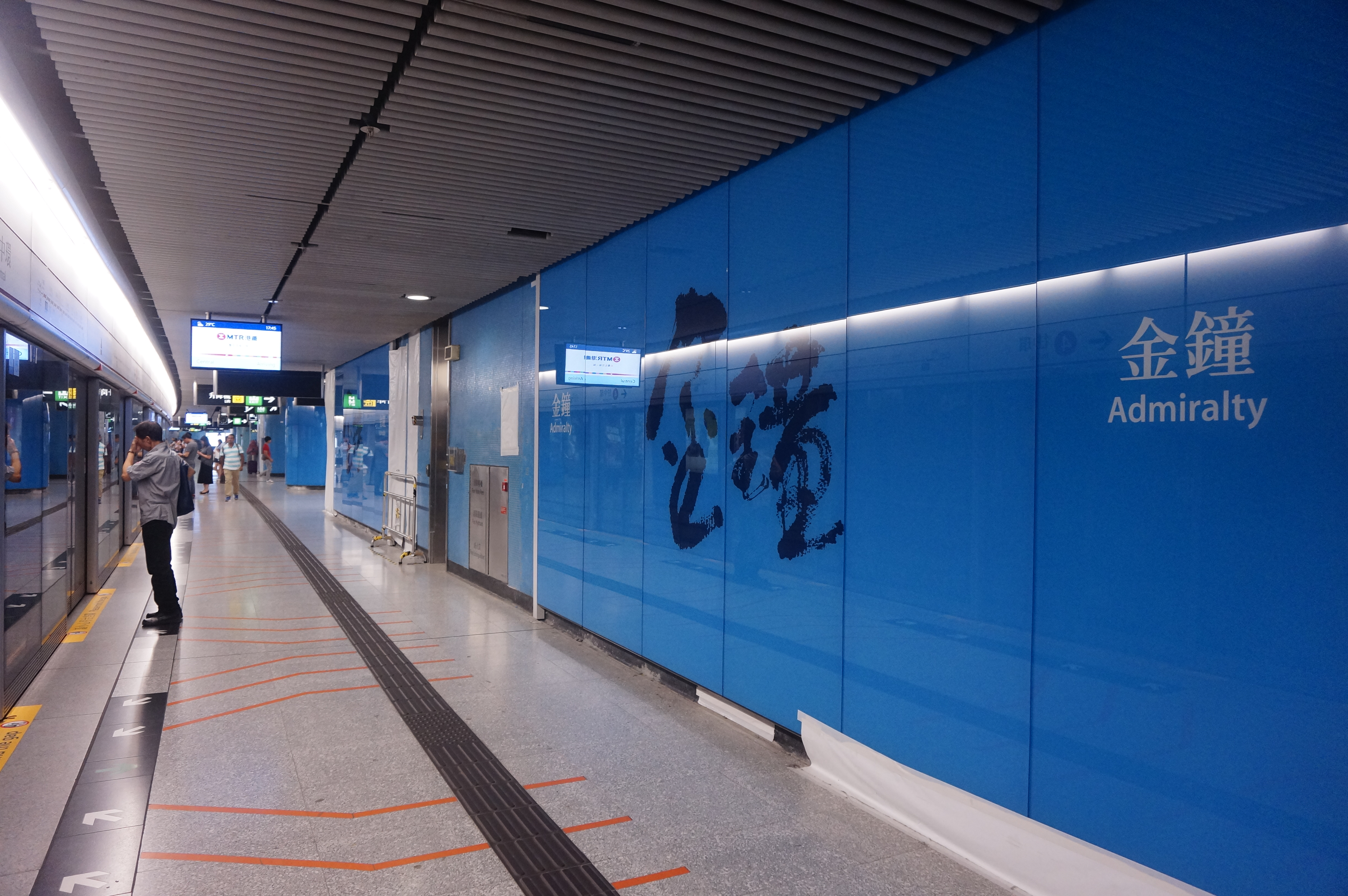 港鐵金鐘站月台